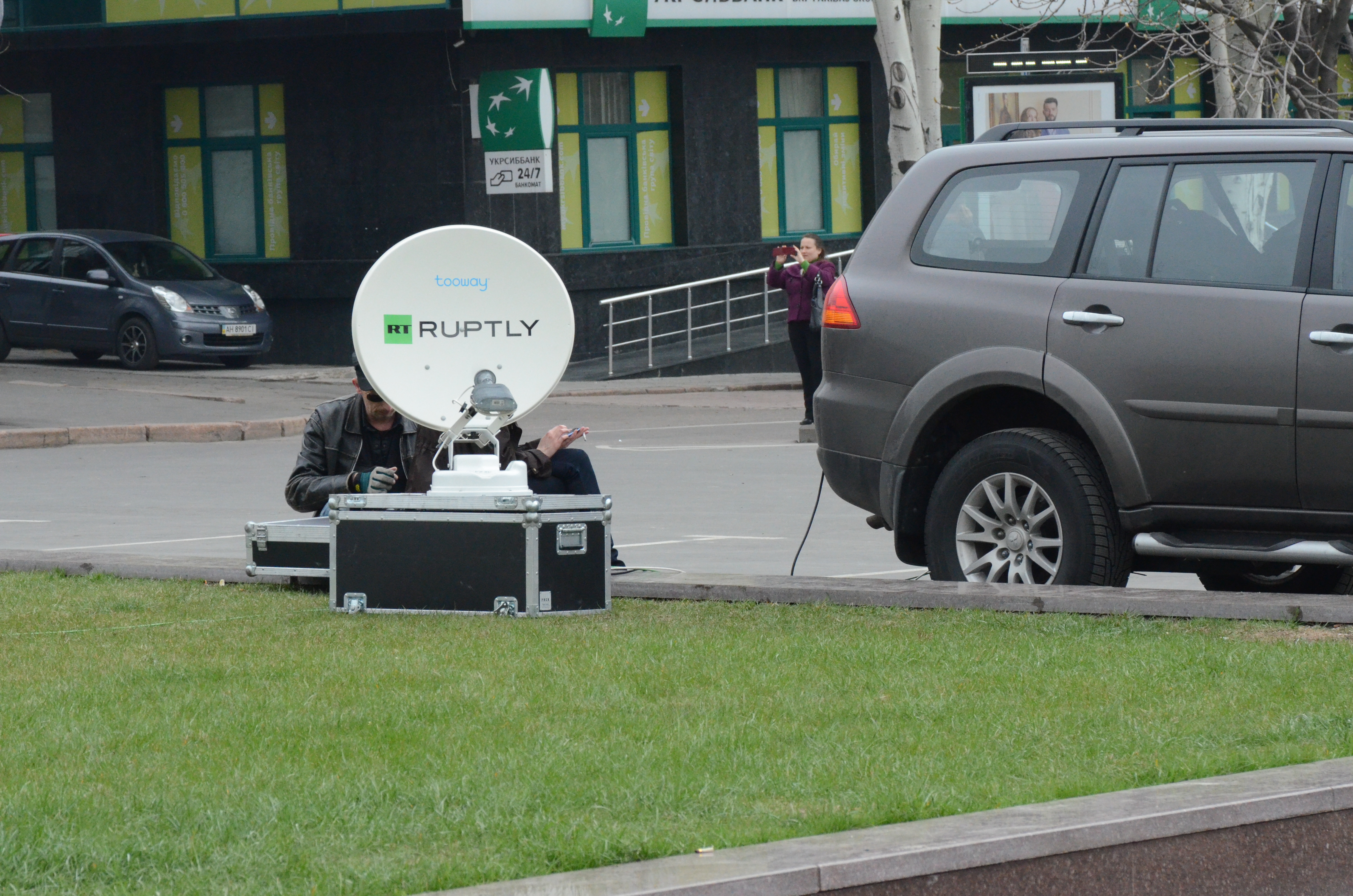 Протесты в Донецке